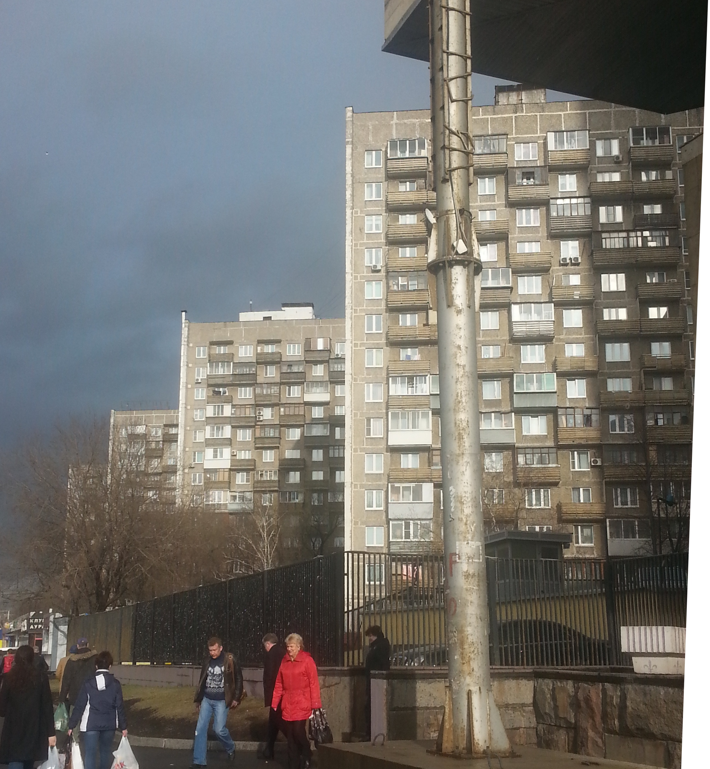 Щелковское шоссе 4, 6, 8, 10